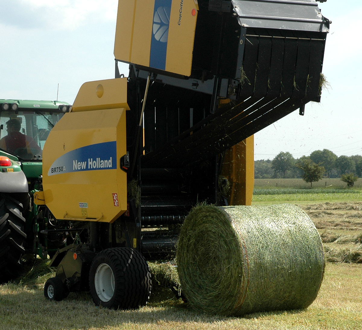 New-Holland-Ballenpresse BR750A in Aktion auf einem Feld